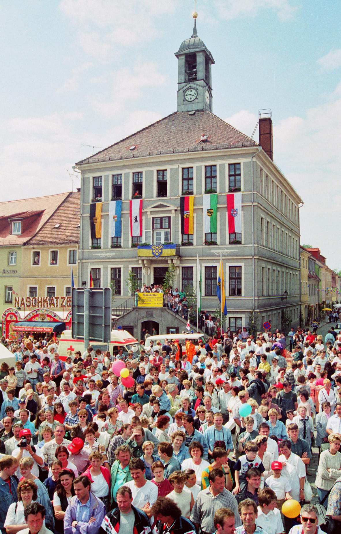 Bischofswerda, Schiebocker Tage, Rathaus